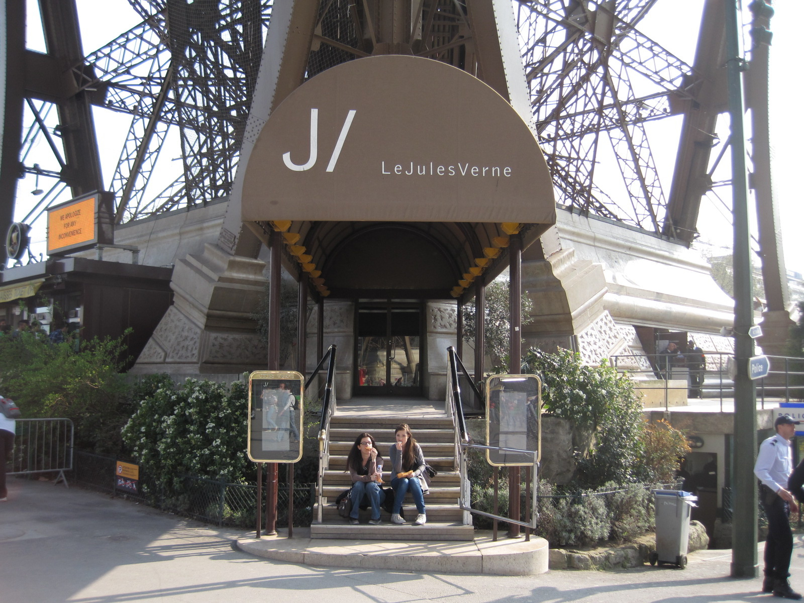 Restaurant " Le Jules Verne " de la Tour Eiffel de Paris